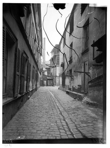 Vue générale